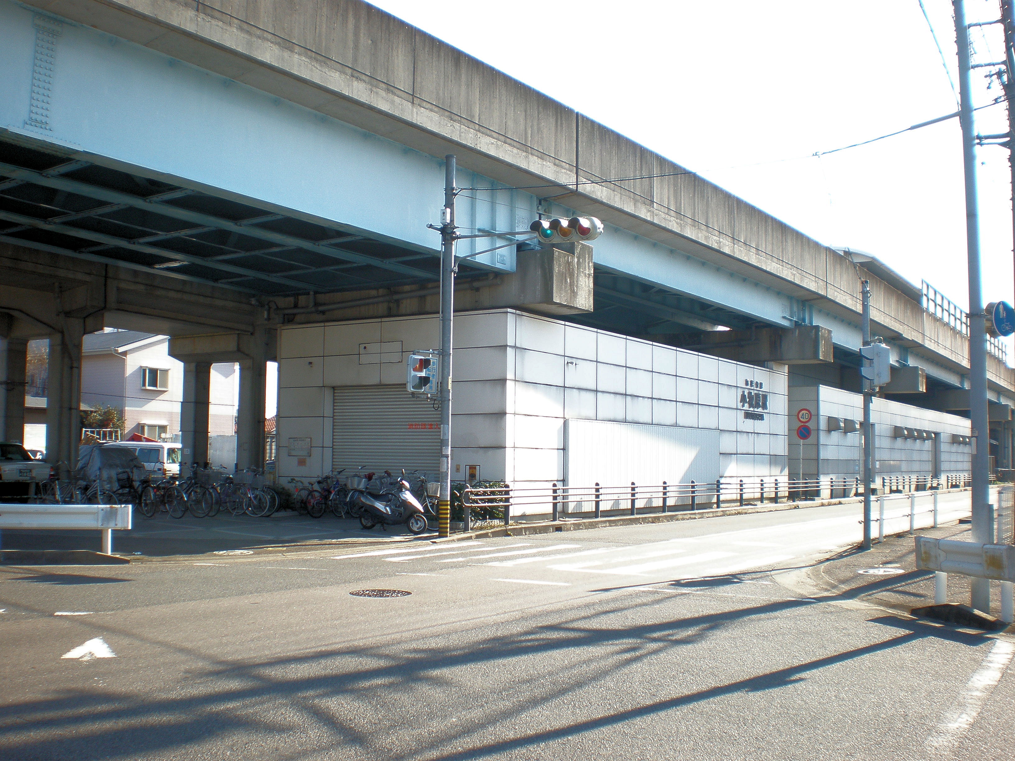 愛知県小牧市にある桃花台線小牧原駅（廃止後）